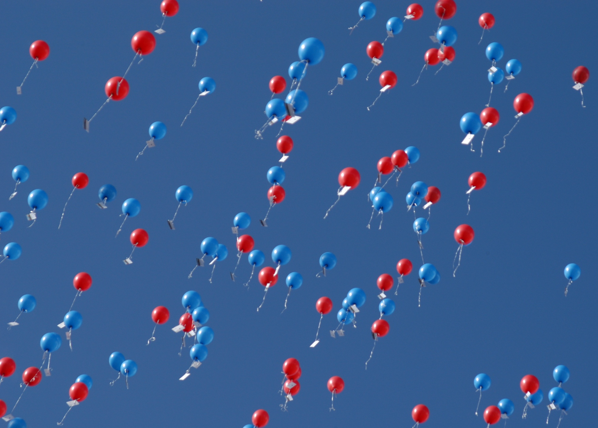 Luftballons